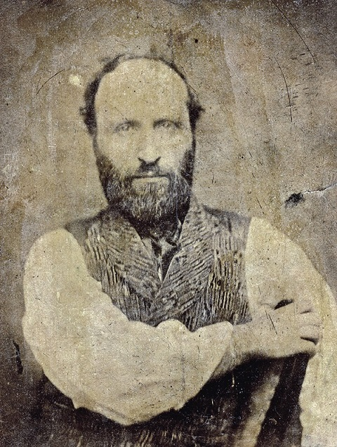 Autoritratto, fotografia al collodio, Musei civici, Udine